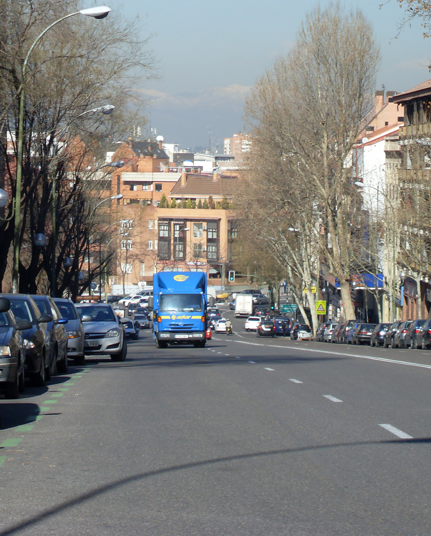 Ronda de Segovia, Madrid, España.